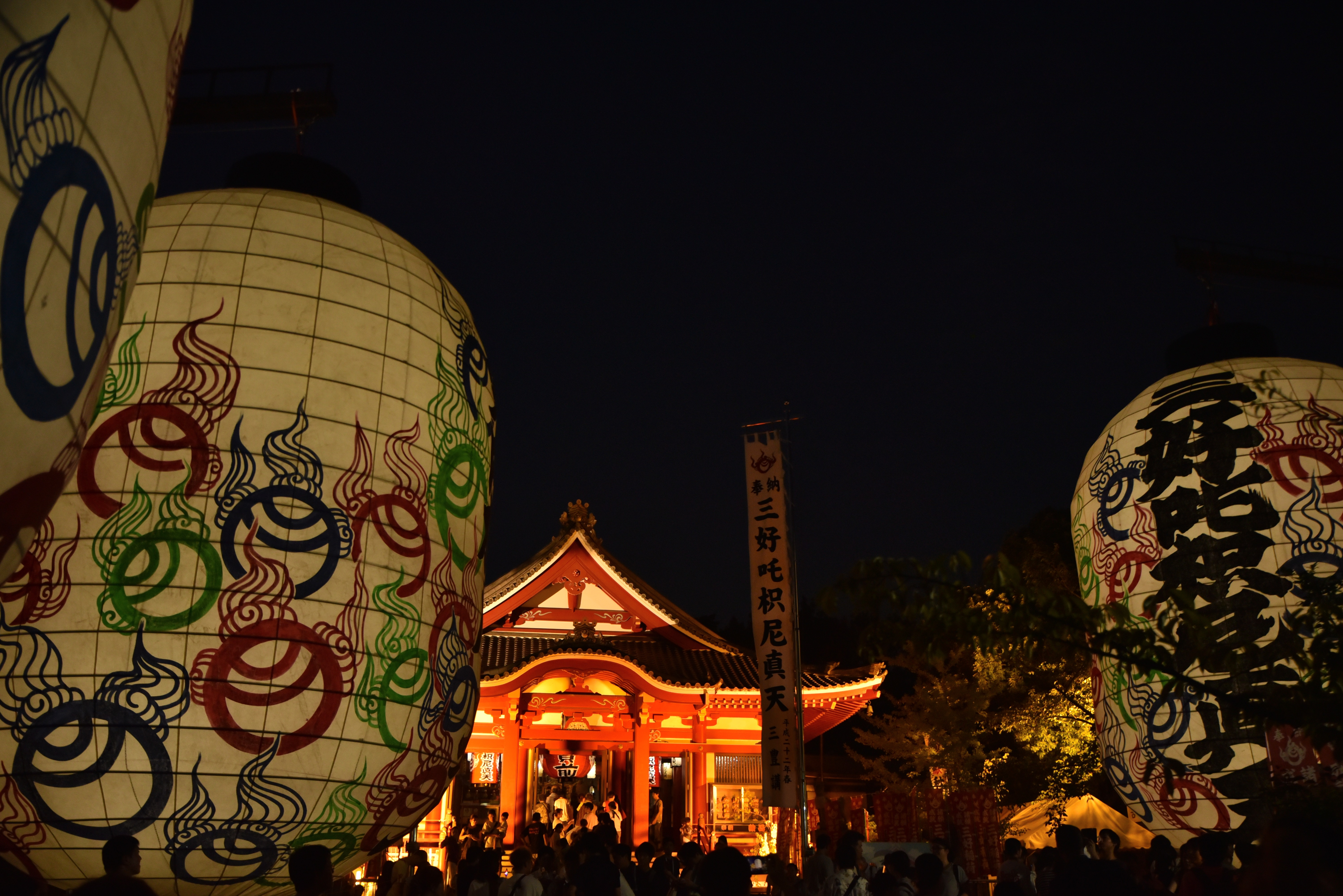 三好大提灯まつり